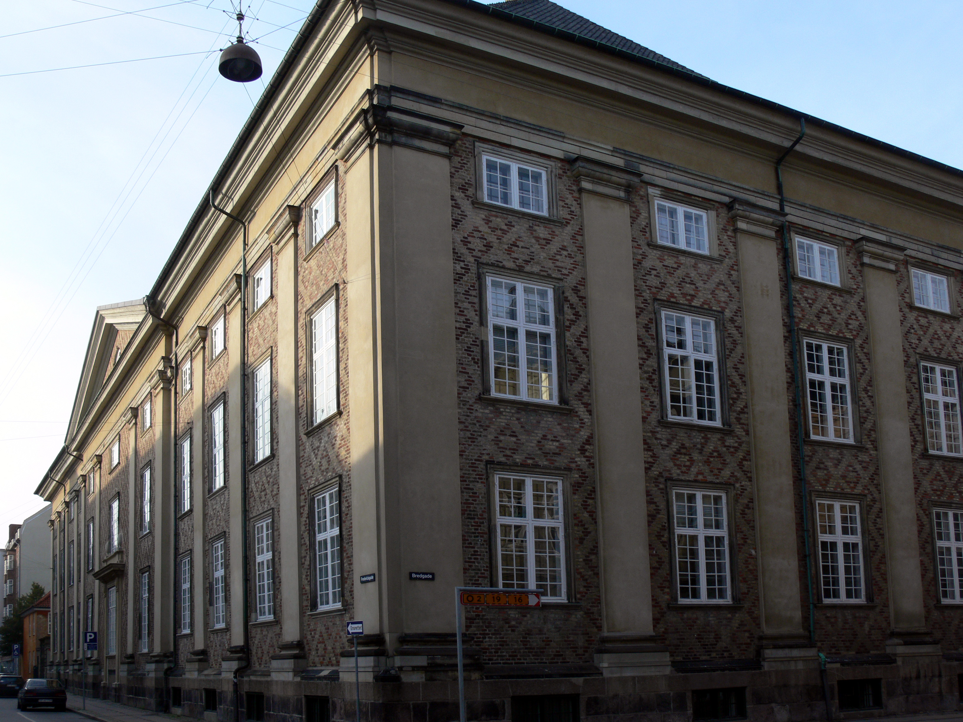 Fridericiagade in Kopenhagen. Landgericht. Nach dem Brand von 1807 tagte hier das Storting.